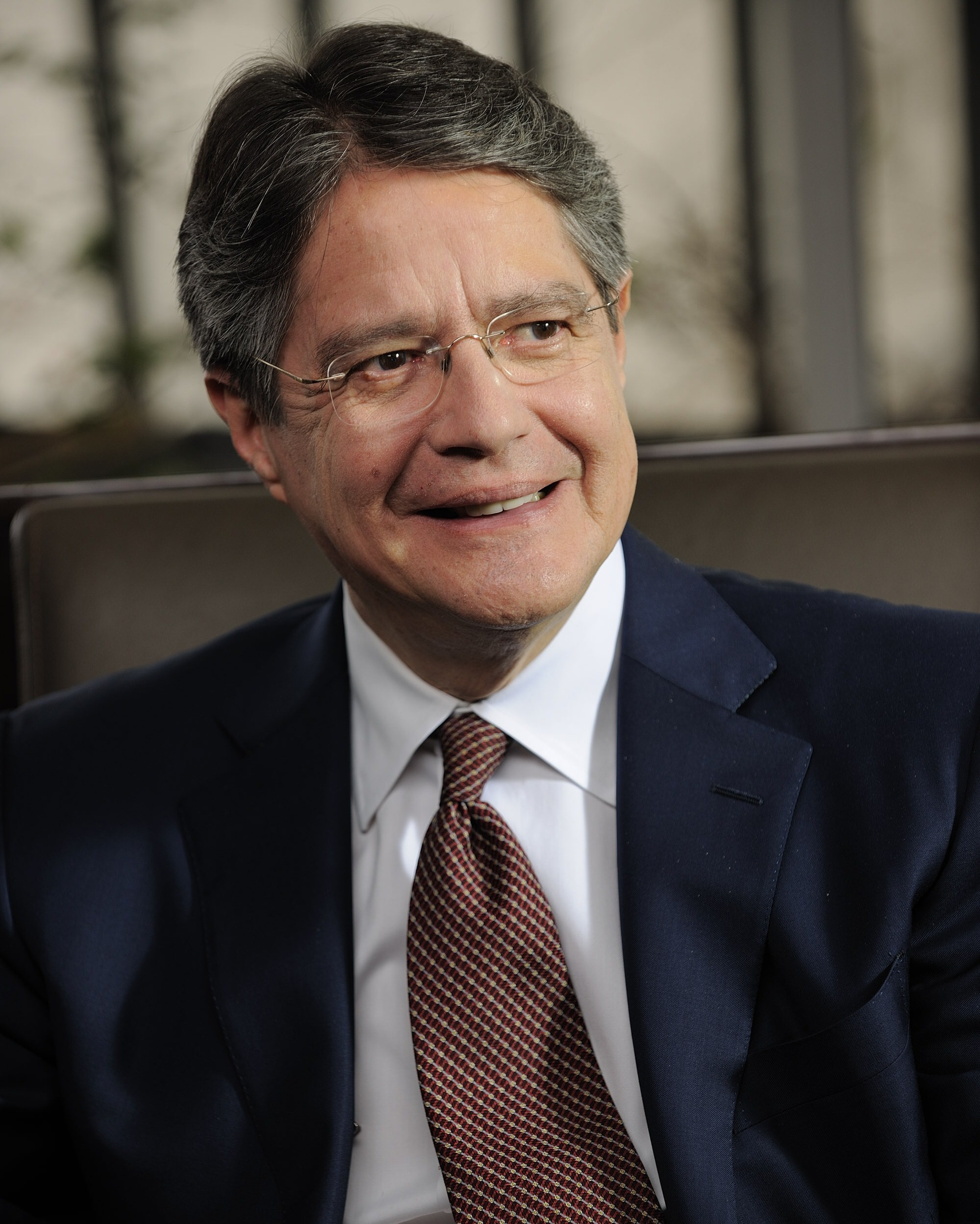 Foto de Guillermo Lasso tipo perfil